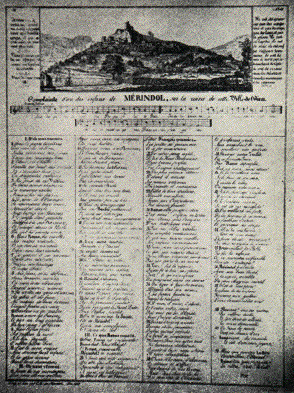 Complainte des martyrs de Mérindol. Dessin, vers et musique de César Malan.